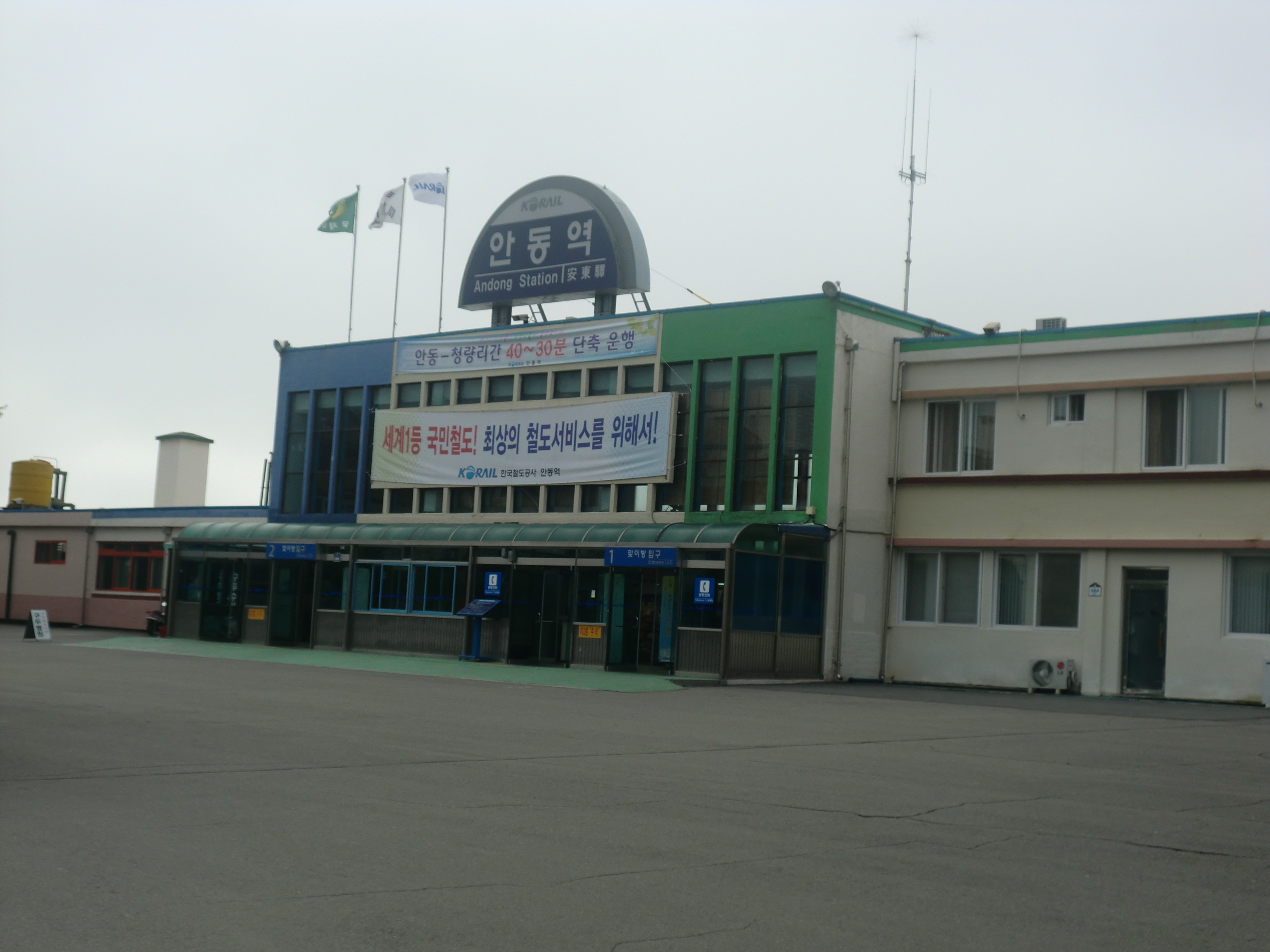 안동역